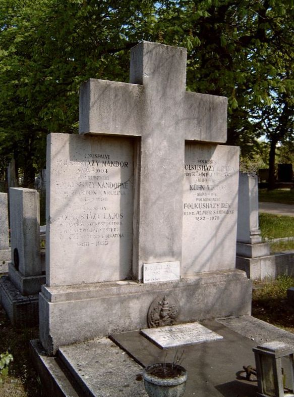 Folkusházy Lajos (Pest, 1868. február 24. – Budapest, 1939. március 28.) Budapest alpolgármesterének sírja Budapesten. Új köztemető: 16/5-1-42/43